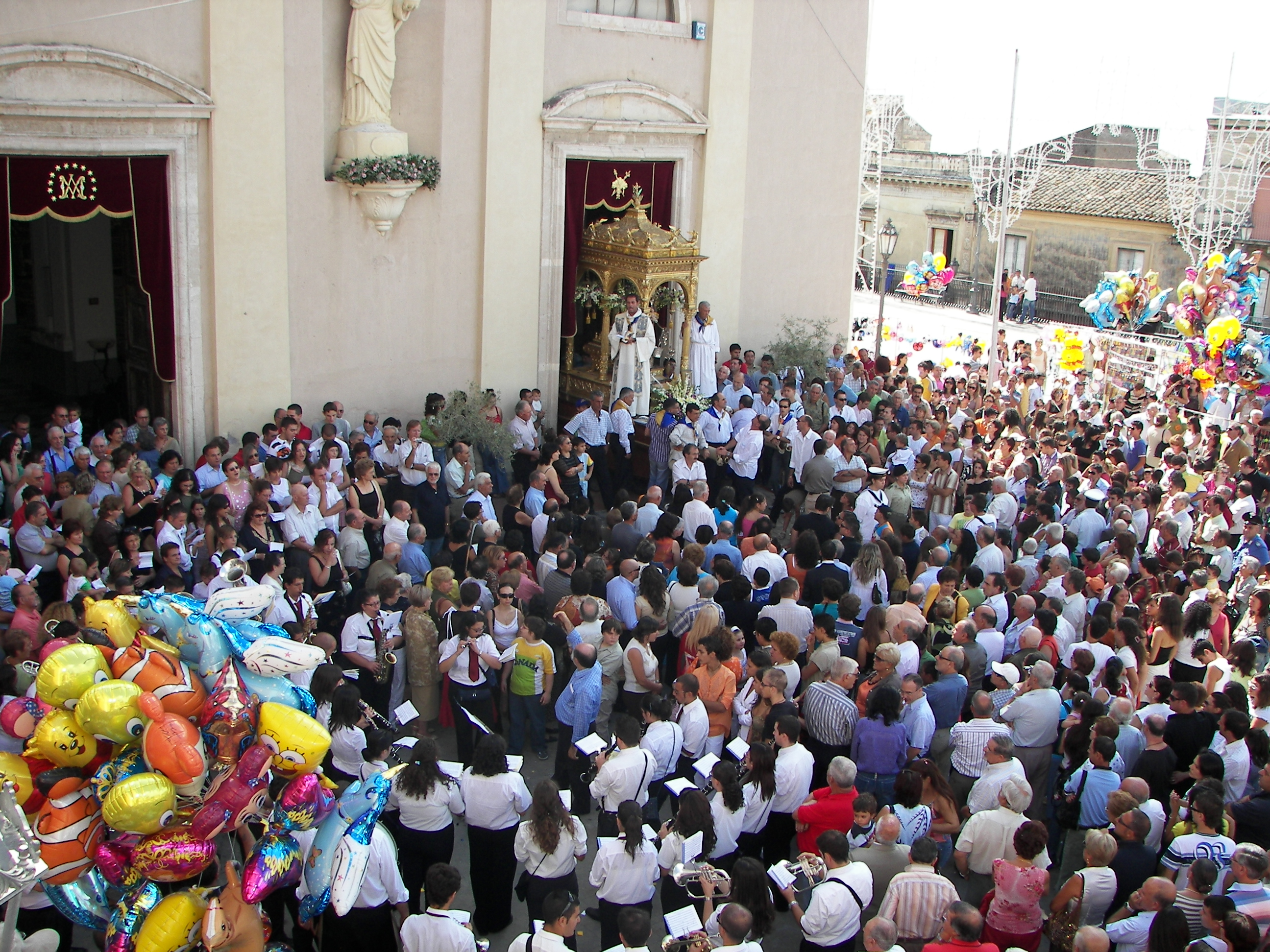 Trionfale uscita del Patrono San Giuseppe